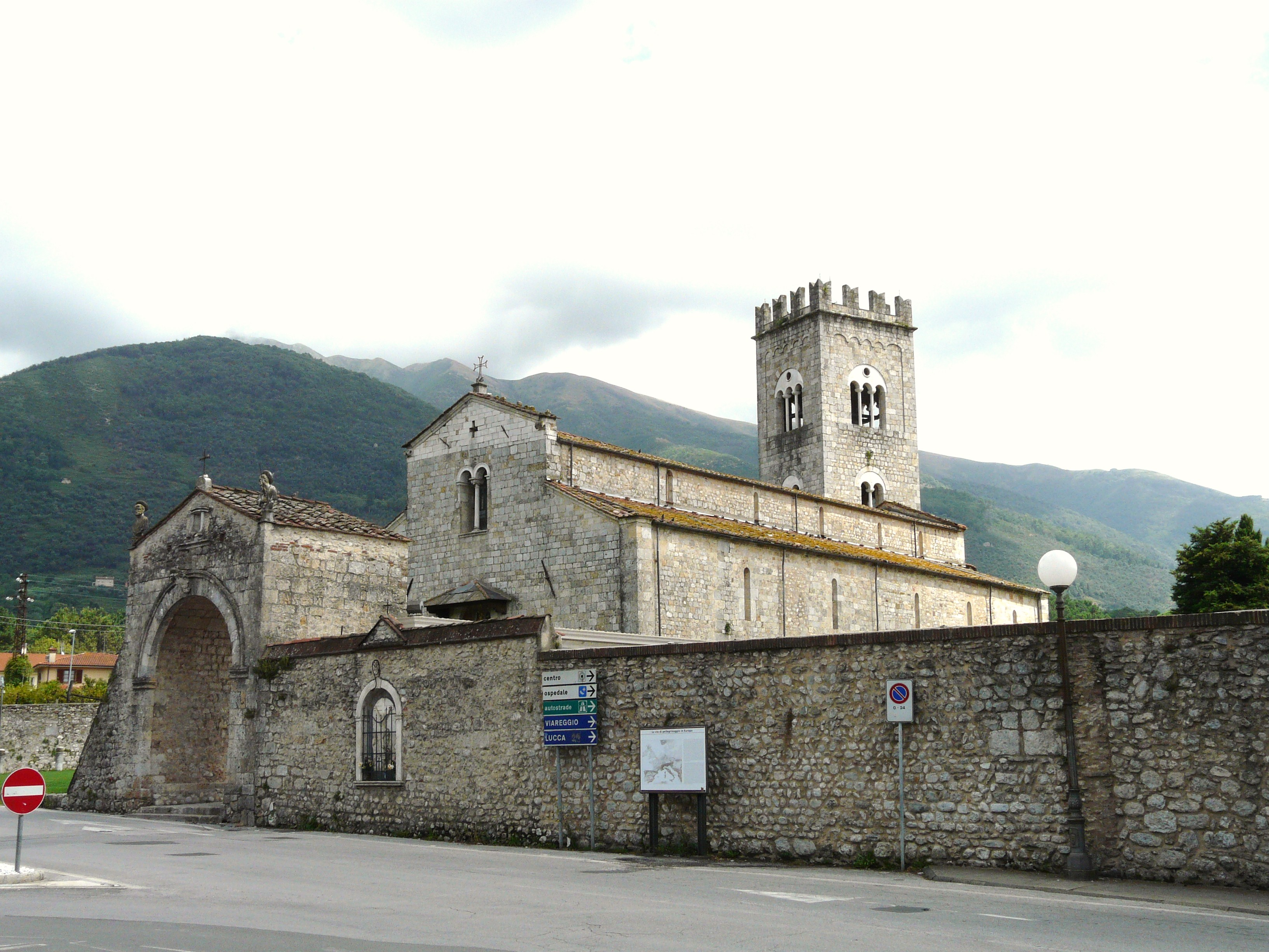 Complesso della badia di San Pietro, Camaiore, Toscana, Italia